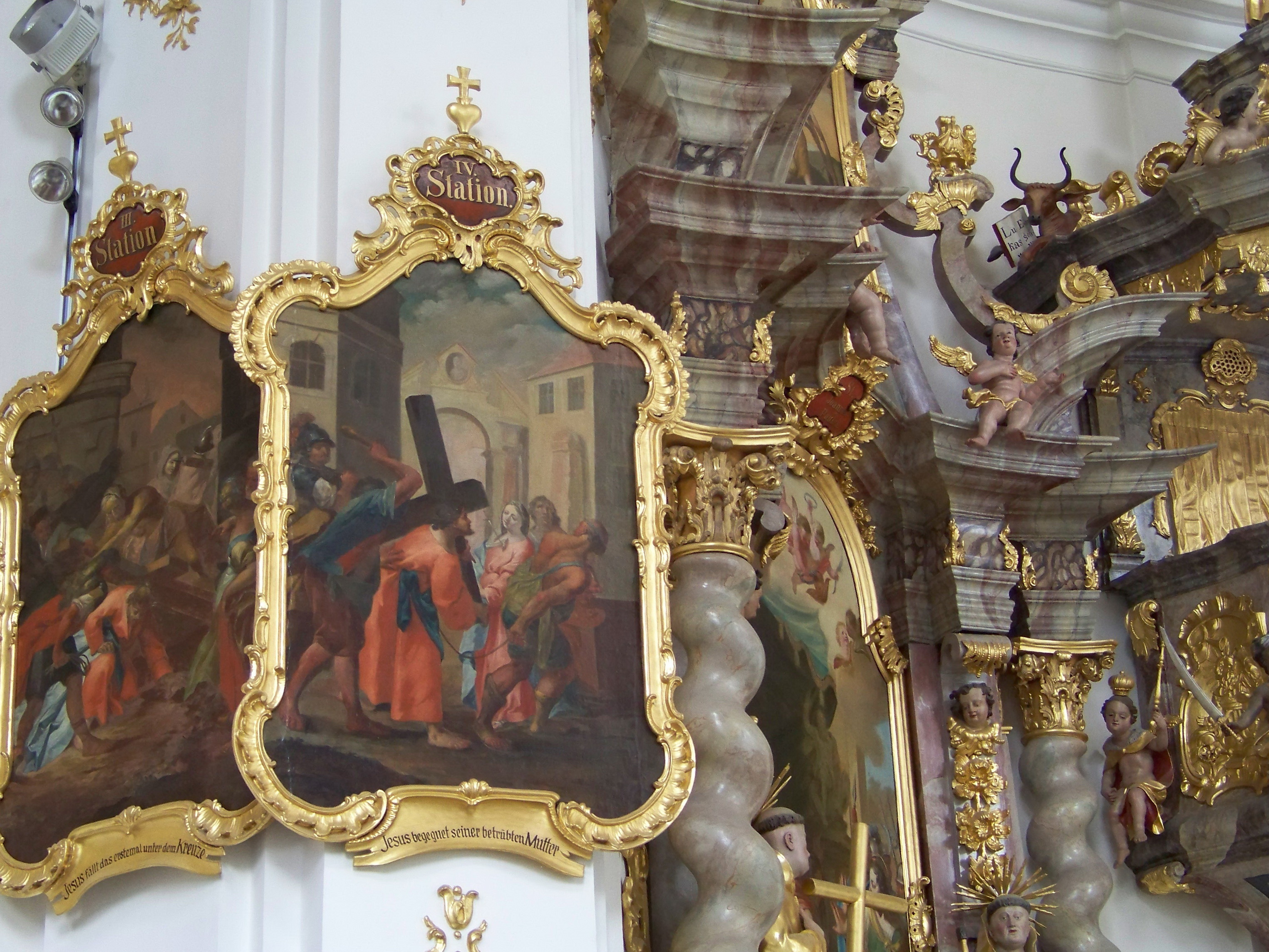 Rottenburg an der Laaber. Oberotterbach, Leonhardistraße 12. Wallfahrtskirche St. Leonhard. Kreuzwegtafeln von Horemans in Rokoko Schnitzrahmen.